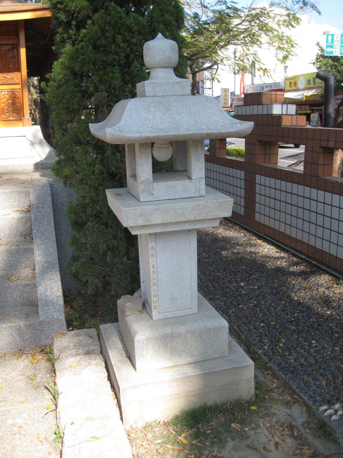 鹽水國小神社石燈籠。